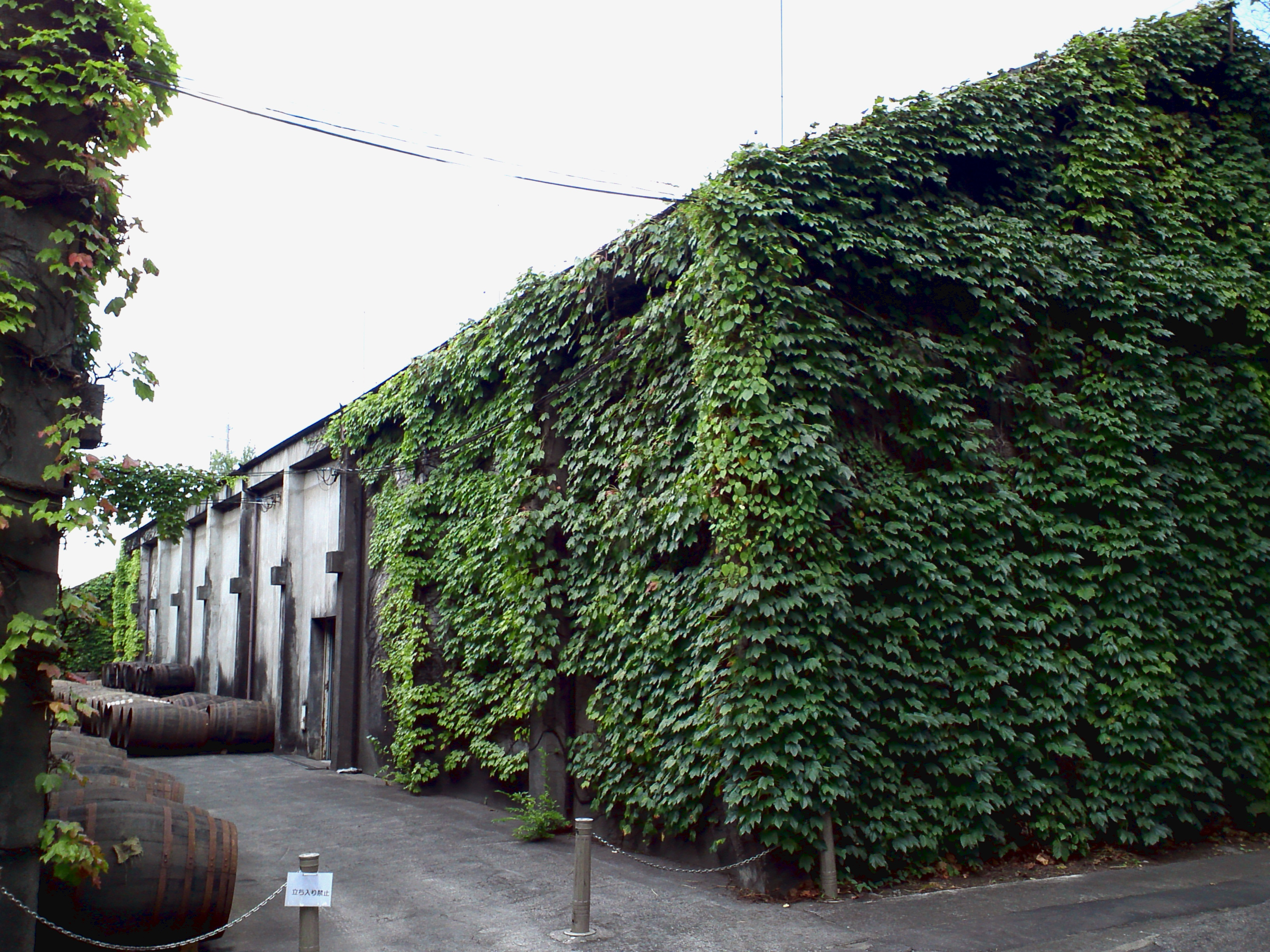 メルシャン軽井沢美術館。ウイスキー蒸留施設の通路と樽。